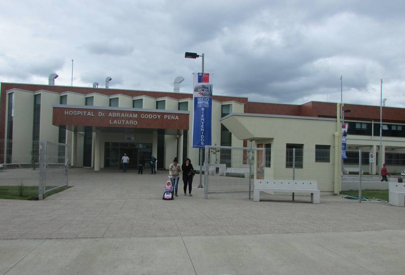 Frontis del Hospital de Lautaro